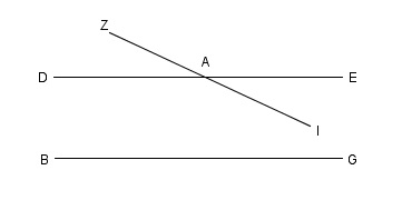 Il·lustració d'una de les proposiciones de les Data d'Euclides